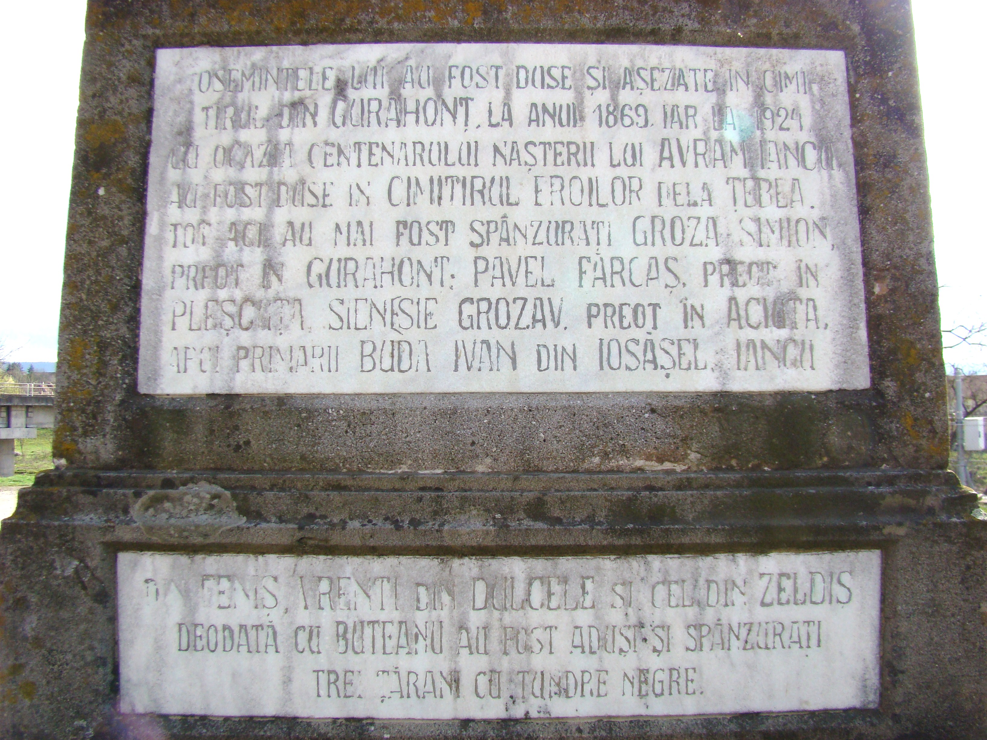 Troiţa lui Ioan Buteanu, strada Iosăşel; sat GURAHONŢ